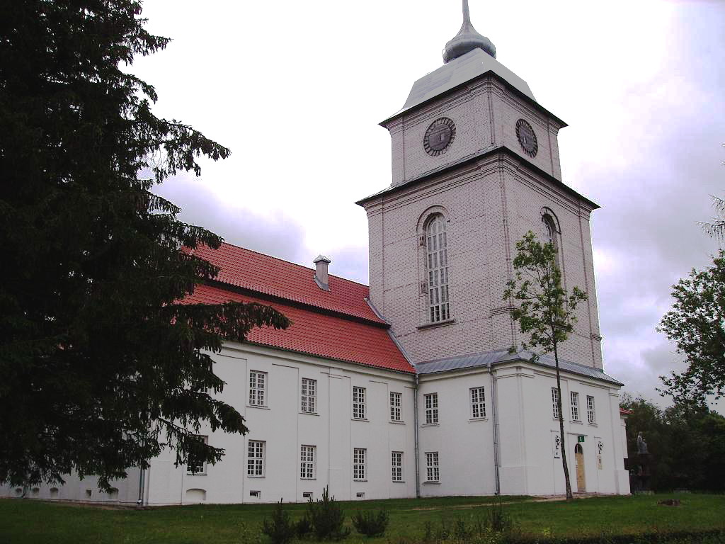 Centro de diocesis Samogitia en Varniai